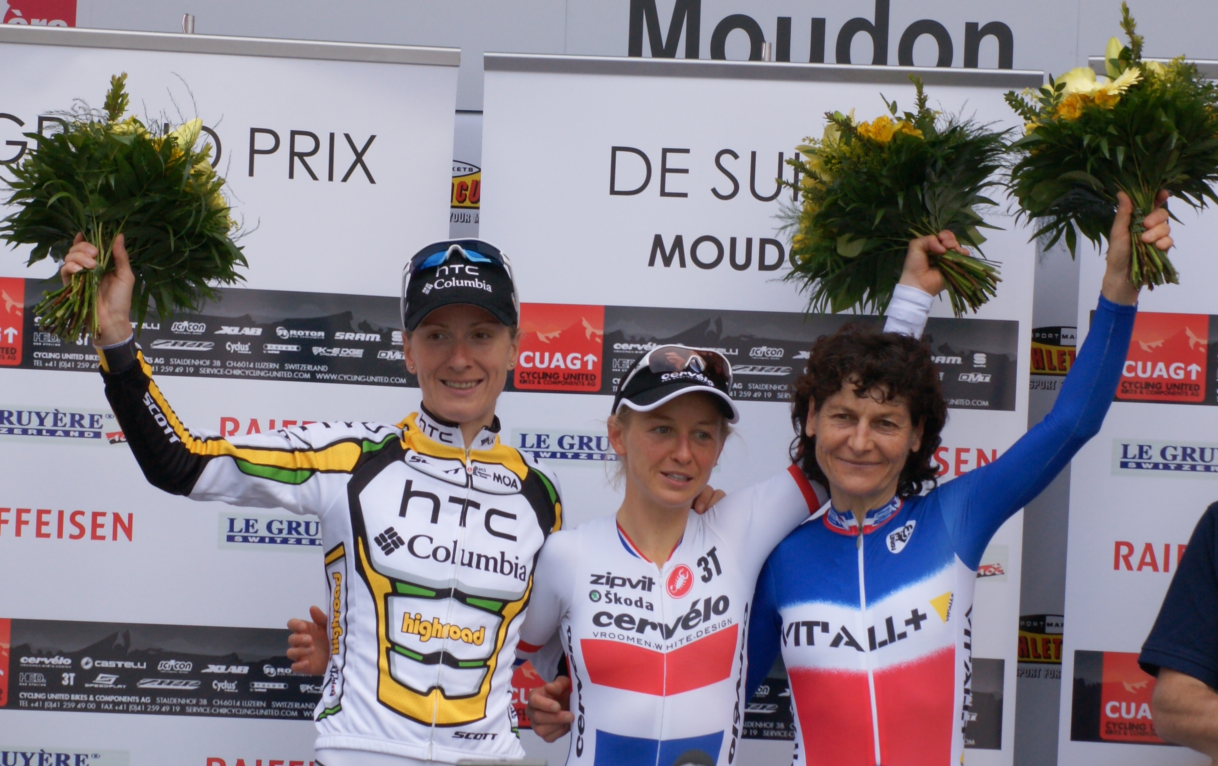 Podium du grand prix de suisse féminin 2010